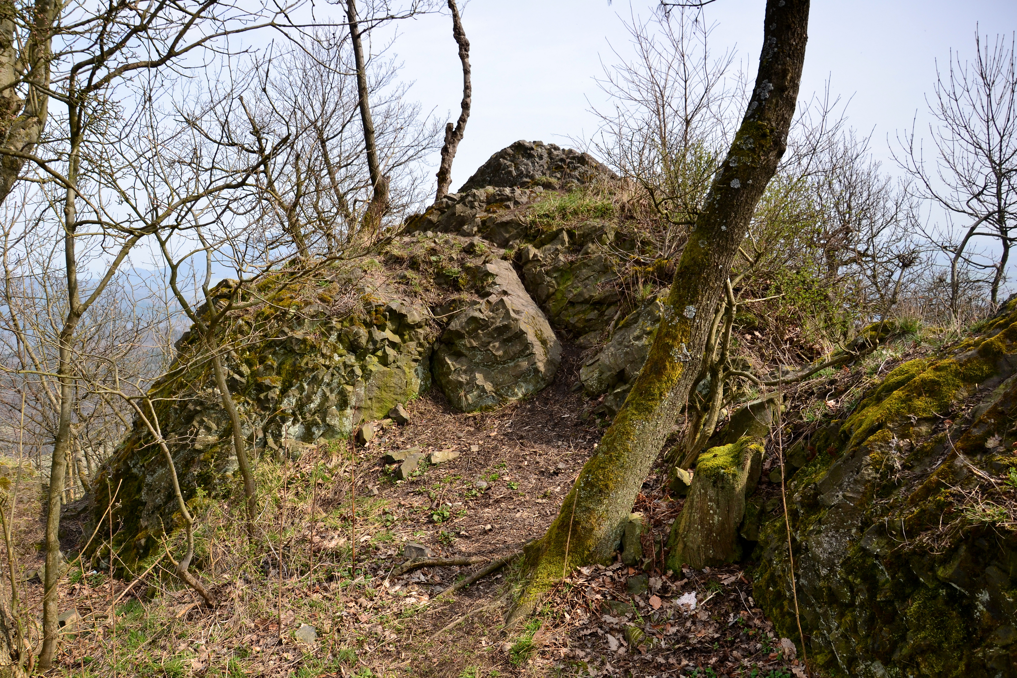 Vrcholová skála, kde stála hlavní budova, Hrad Panna, pp. 386, Řepčice (Třebušín).